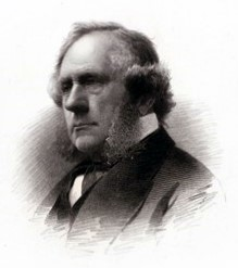 Fletcher Harper.